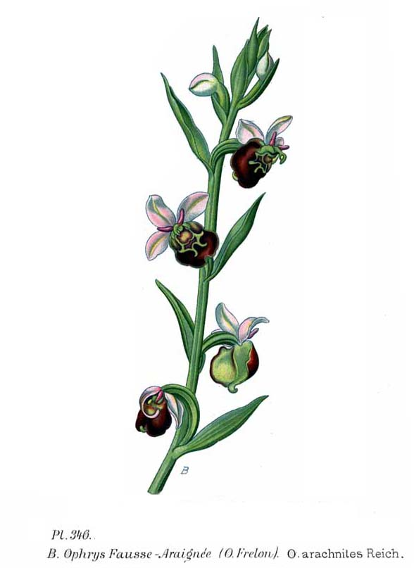 Ophrys apifera Reich.